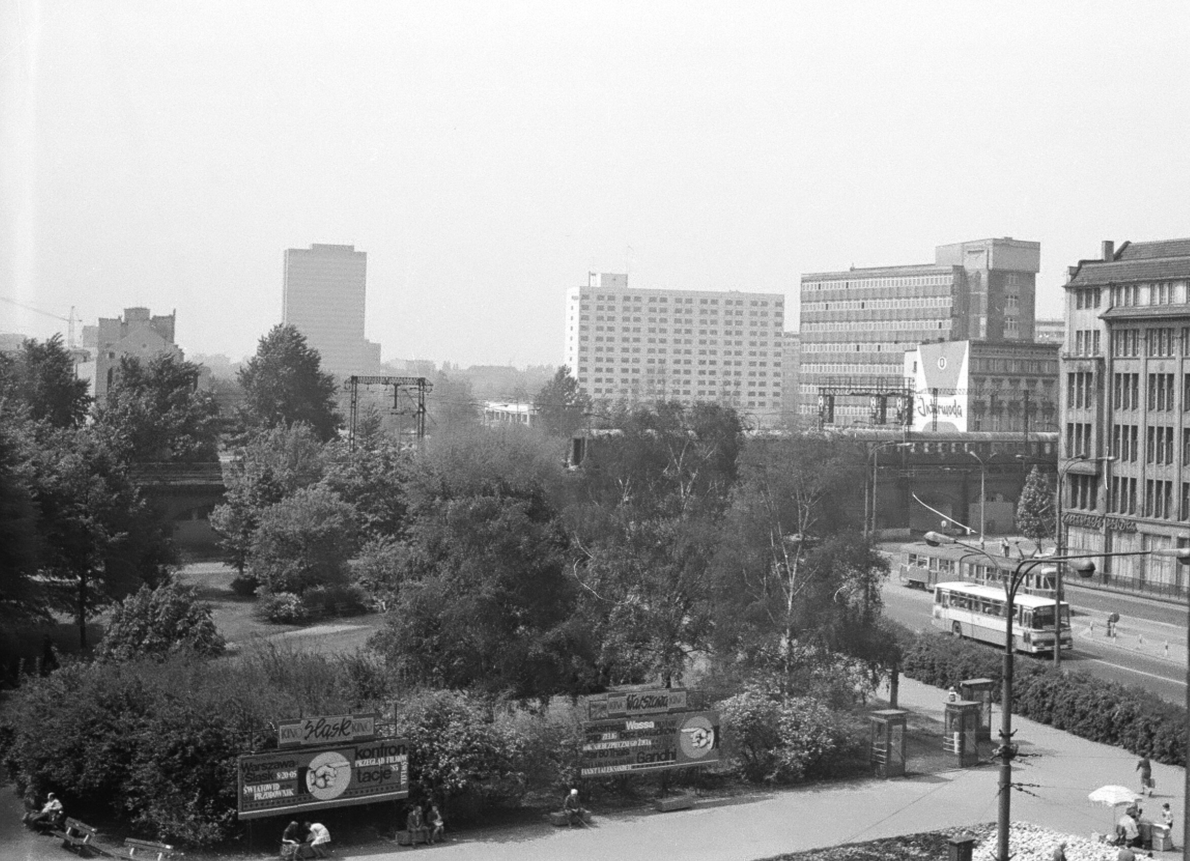 Wrocław w 1983 r. Skwer przy skrzyżowaniu ulic: Świerczewskiego i Świdnickiej. Widoczne m.in. budynki "Poltegoru" (1982-2009) i hotelu "Orbis Wrocław" (1980) zlokalizowane przy ul. Powstańców Ślaskich. Wzdłuż ulicy Świerczewskiego widoczne tablice reklamowe kin "Śląsk" i "Warszawa". Obecnie skwer nosi imię Wojciecha Młynarskiego, a ulica Świerczewskiego po dekomunizacji w 1992 r. to ulica marszałka Piłsudskiego.